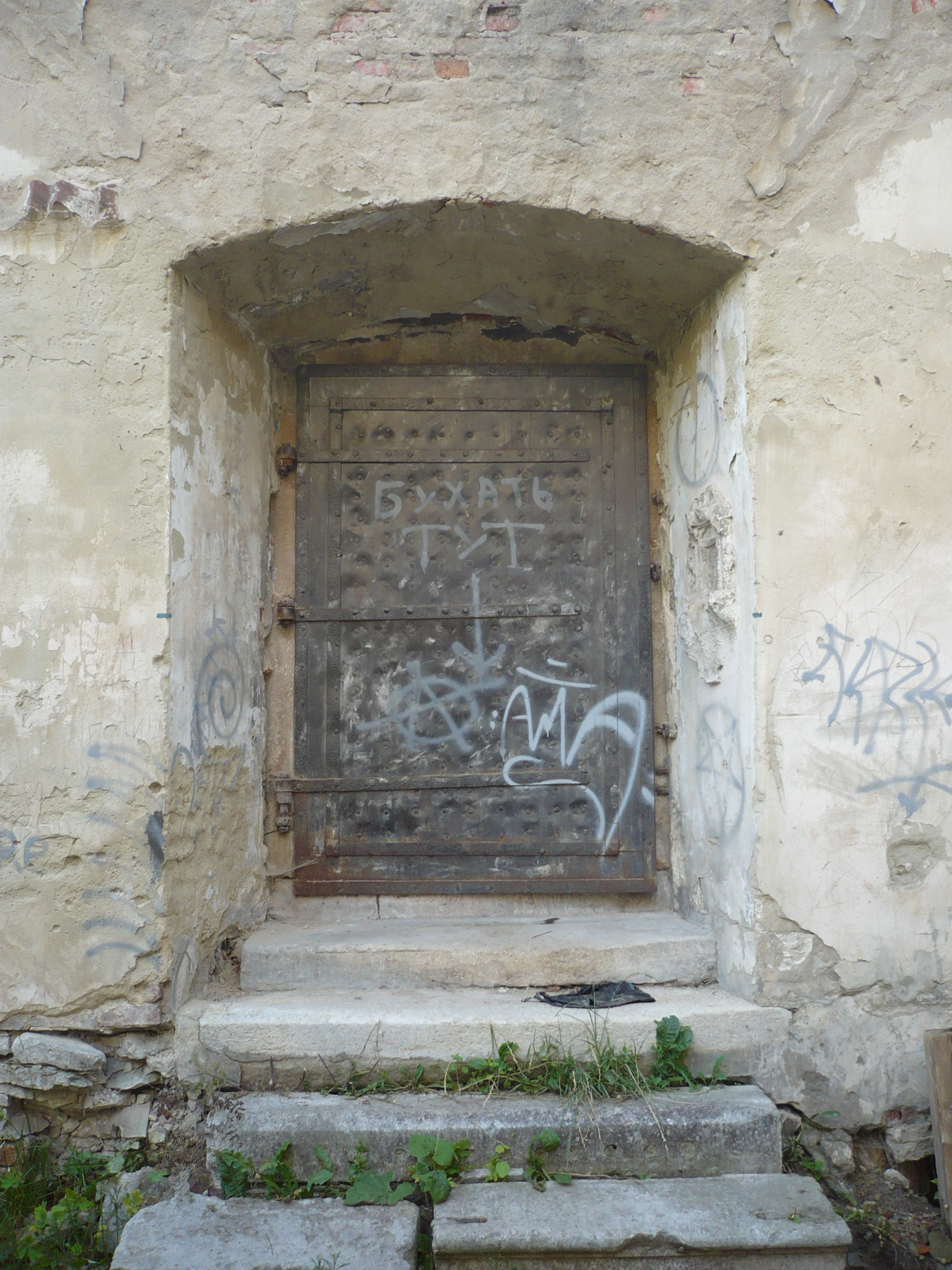 Lwów. Synagoga Złota Roża